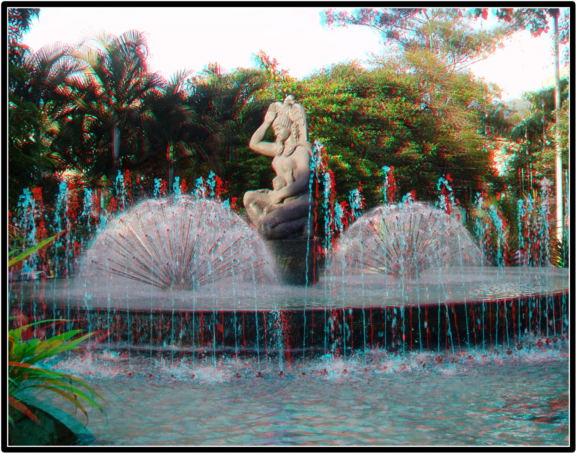 La Bachué, realizada por el escultor antioqueño José Horacio Betancur (1929-1959), en los primeros años cincuenta. Fué muy criticada en su momento, más por razones éticas que estéticas. Técnica: concreto patinado.